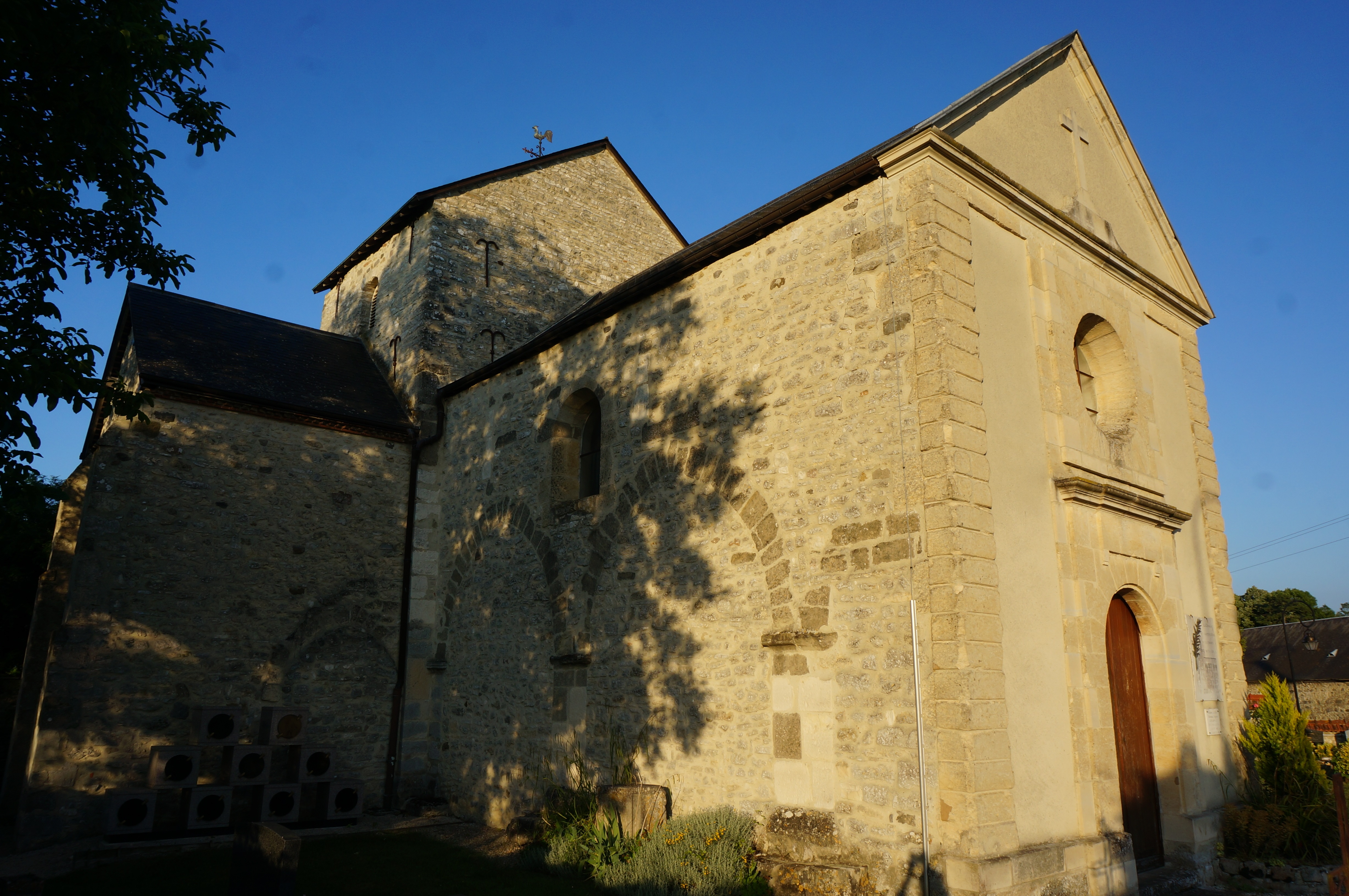 l'église de Châlons-sur-Vesle.